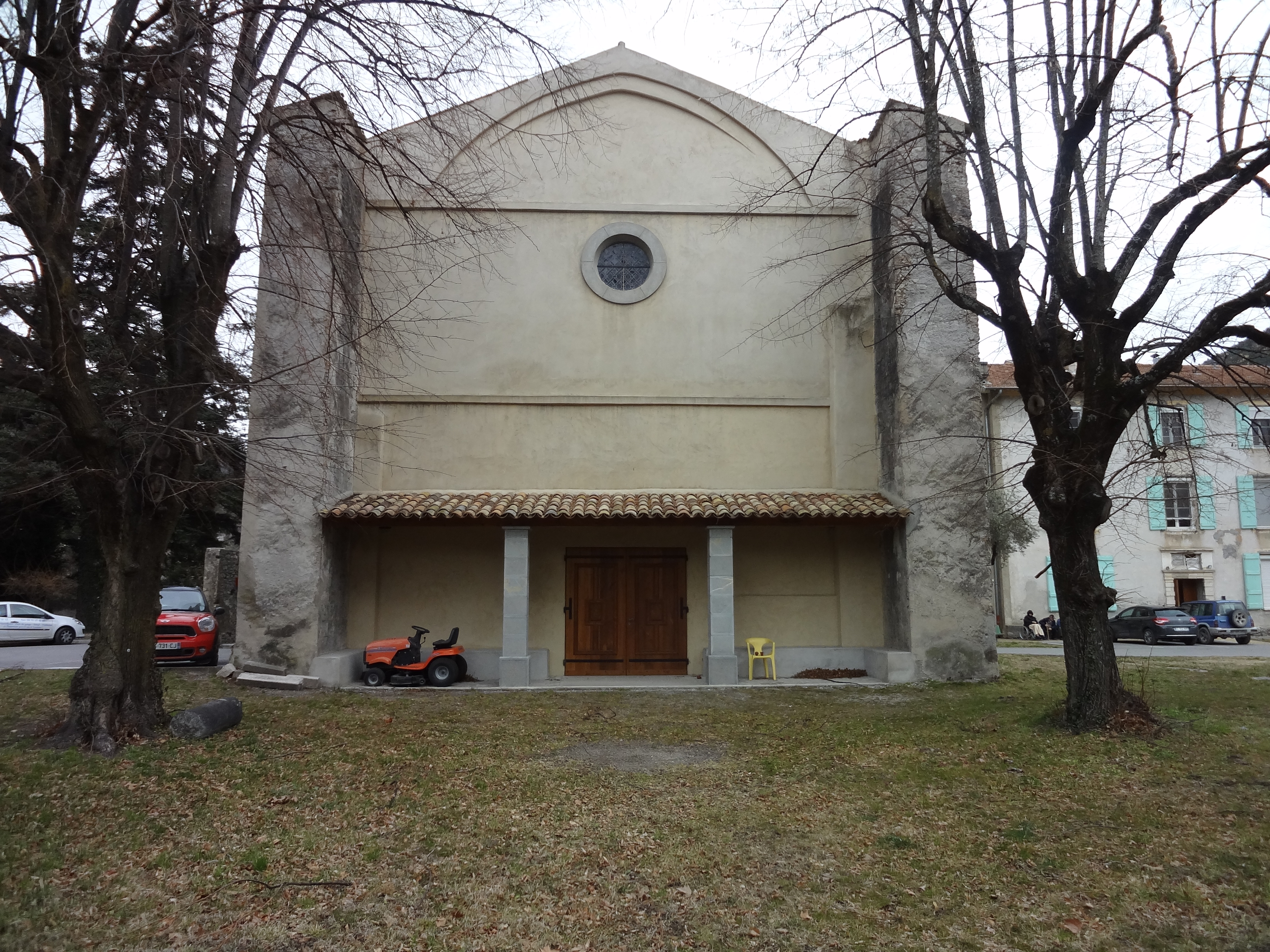 Façade de l’ancienne cathédrale Notre-Dame-de-la-Seds à Glandèves, à Entrevaux